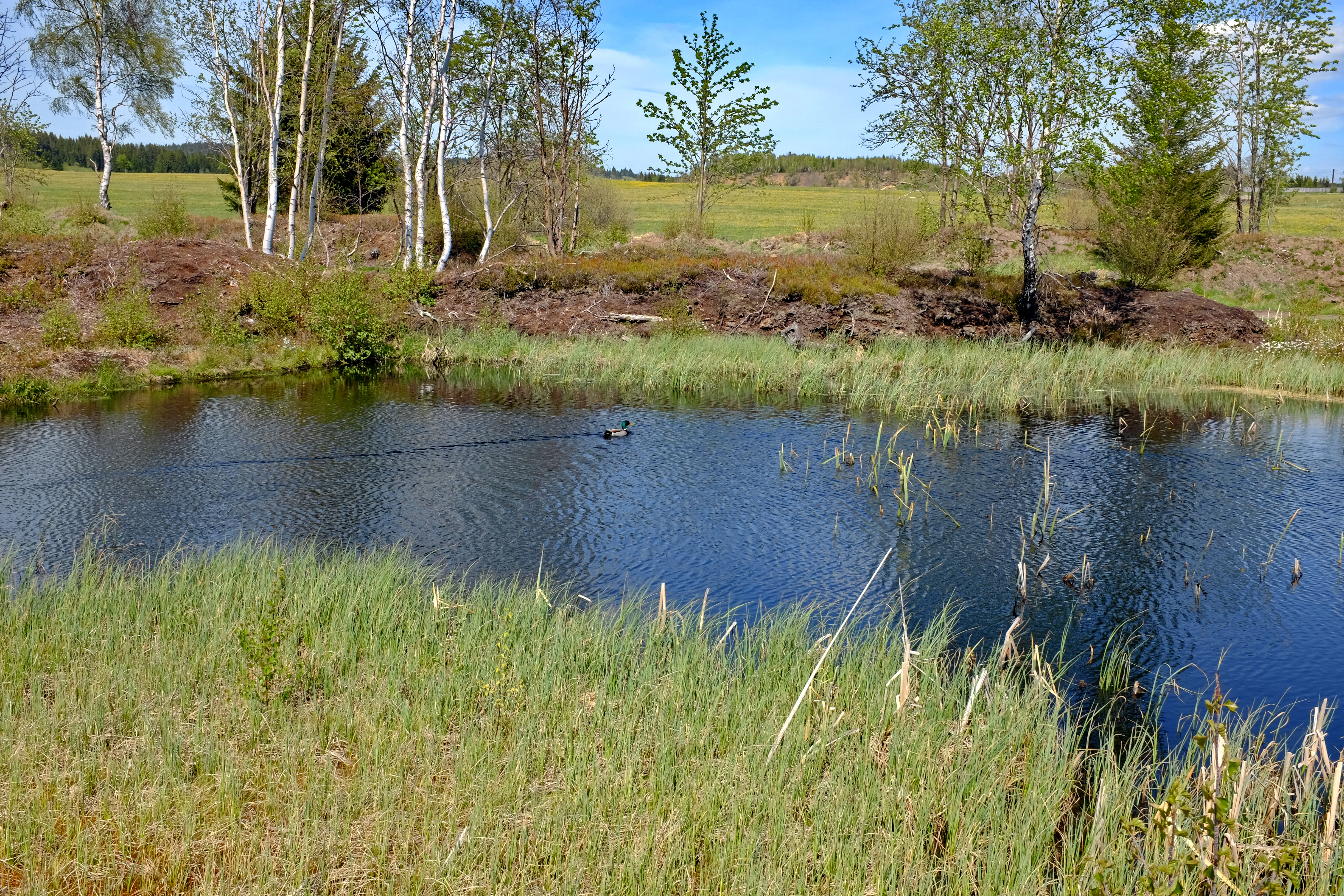 Přírodní památka Pernink, Pernink, Krušné hory, okres Karlovy Vary